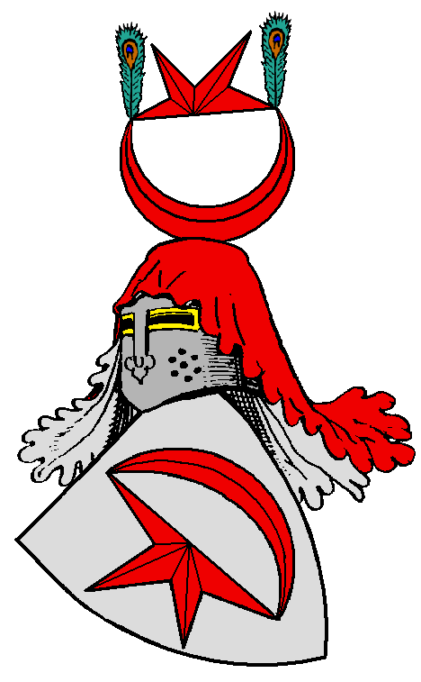 Stammwappen der altadligen von Friesen, die erstmals Ende des 14. Jahrhunderts in Franken urkundlich erscheinen. Die Familie, von der einzelne Zweige bis heute bestehen, gelangte später vor allem in Thüringen und Sachsen zu Besitz und Ansehen.